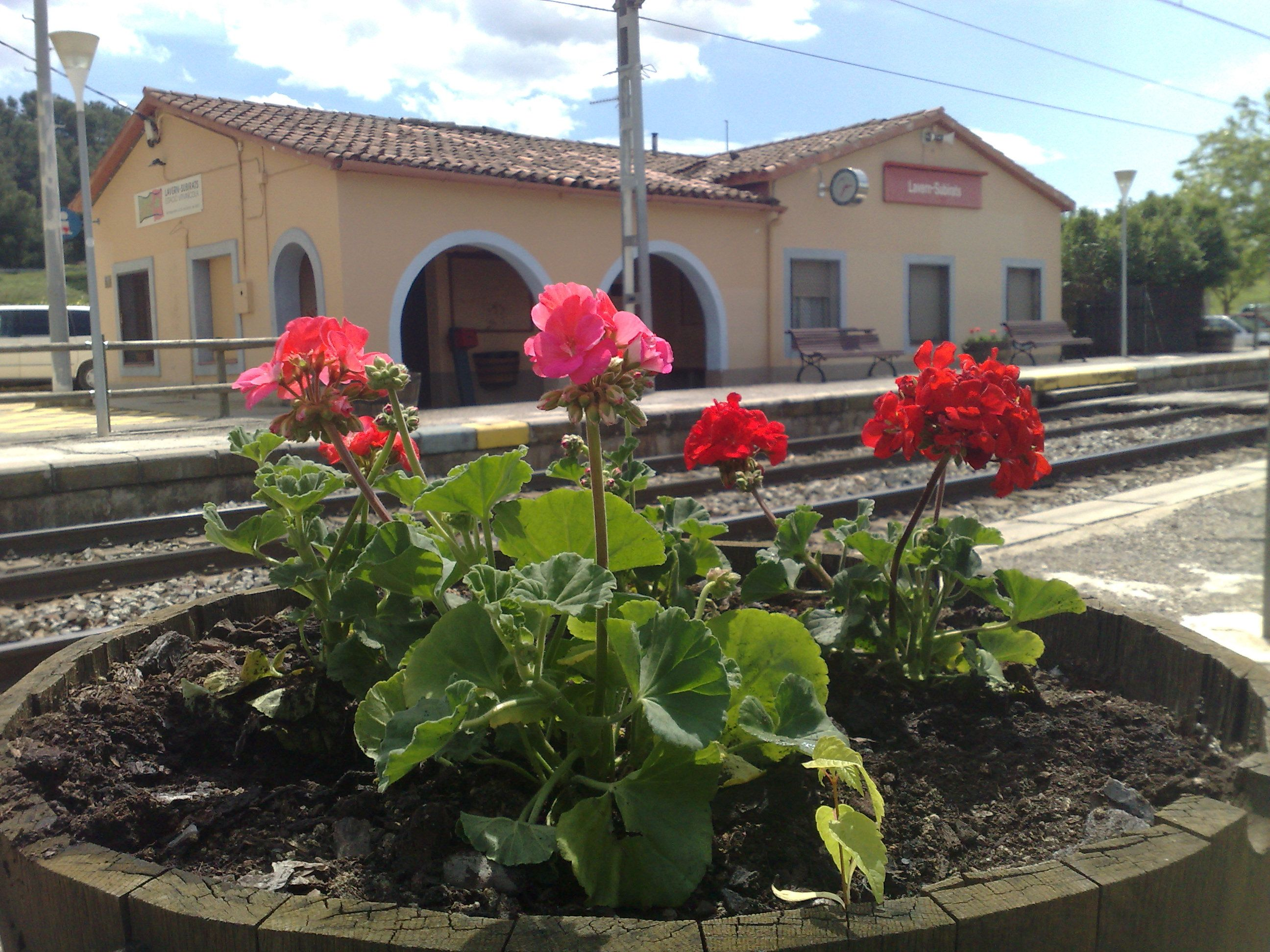 Estación de Lavern-Subirats (Subirats, provincia de Barcelona, Cataluña).